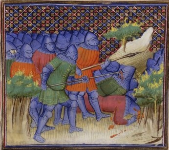 Bataille de Brignais (1362)